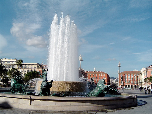 La fontaine du soleil, place Masséna, à Nice